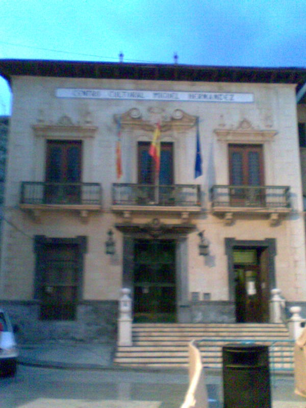 Centro Cultural Miguel Hernández, antigua Caja de Ahorros de Monserrate, en Orihuela.